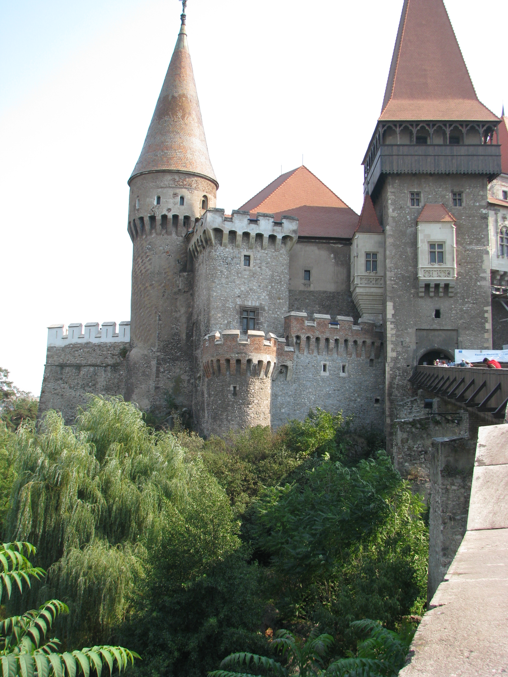 Castelul Corvinilor, azi muzeu